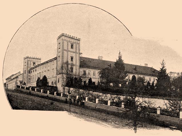 Garamszentkereszt